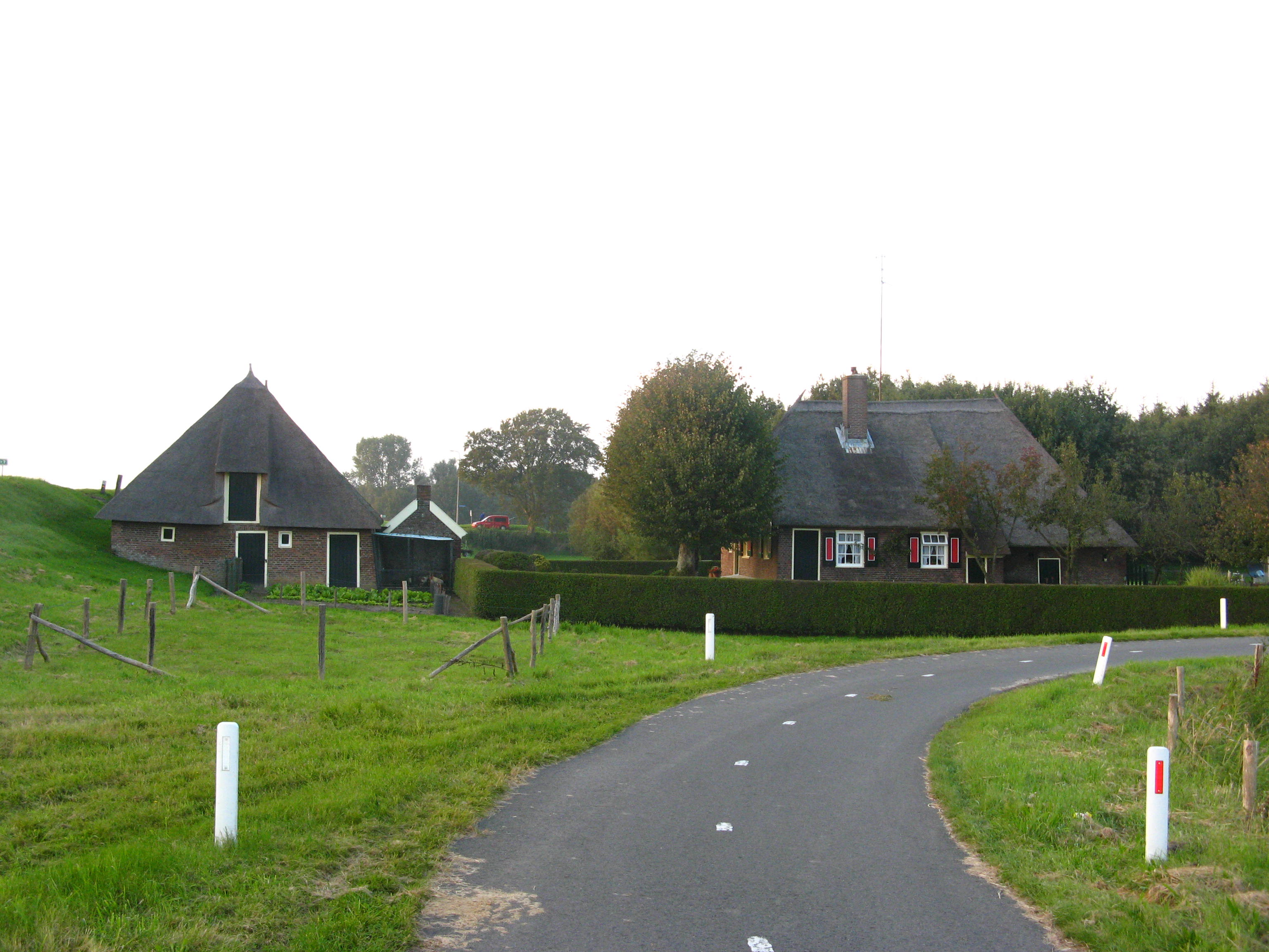 Boerderij onder met riet gedekt wolfdak. Voorgevel met vlechtingen, jaartalankers: 1731 en vensters met luiken. Behoort tot het landgoed "De Haere". Op het erf een bakhuis en stenen schuur met rieten schilddak.